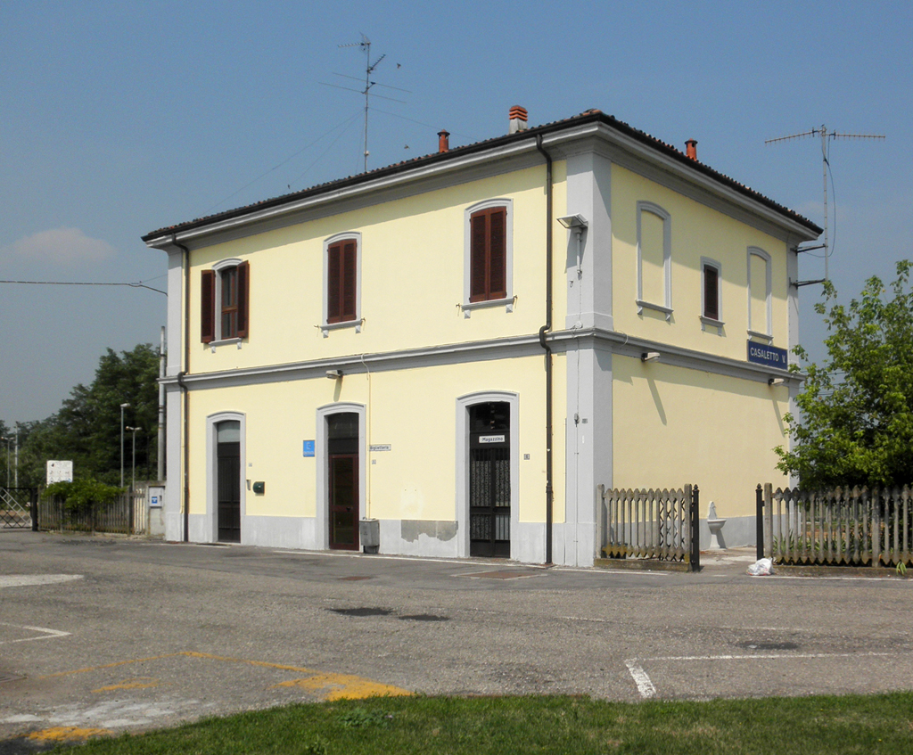 Stazione ferroviaria di Casaletto Vaprio